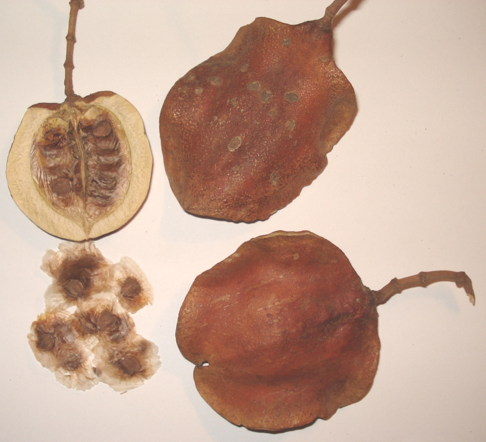 Samenkapseln von Jacaranda mimosifolia